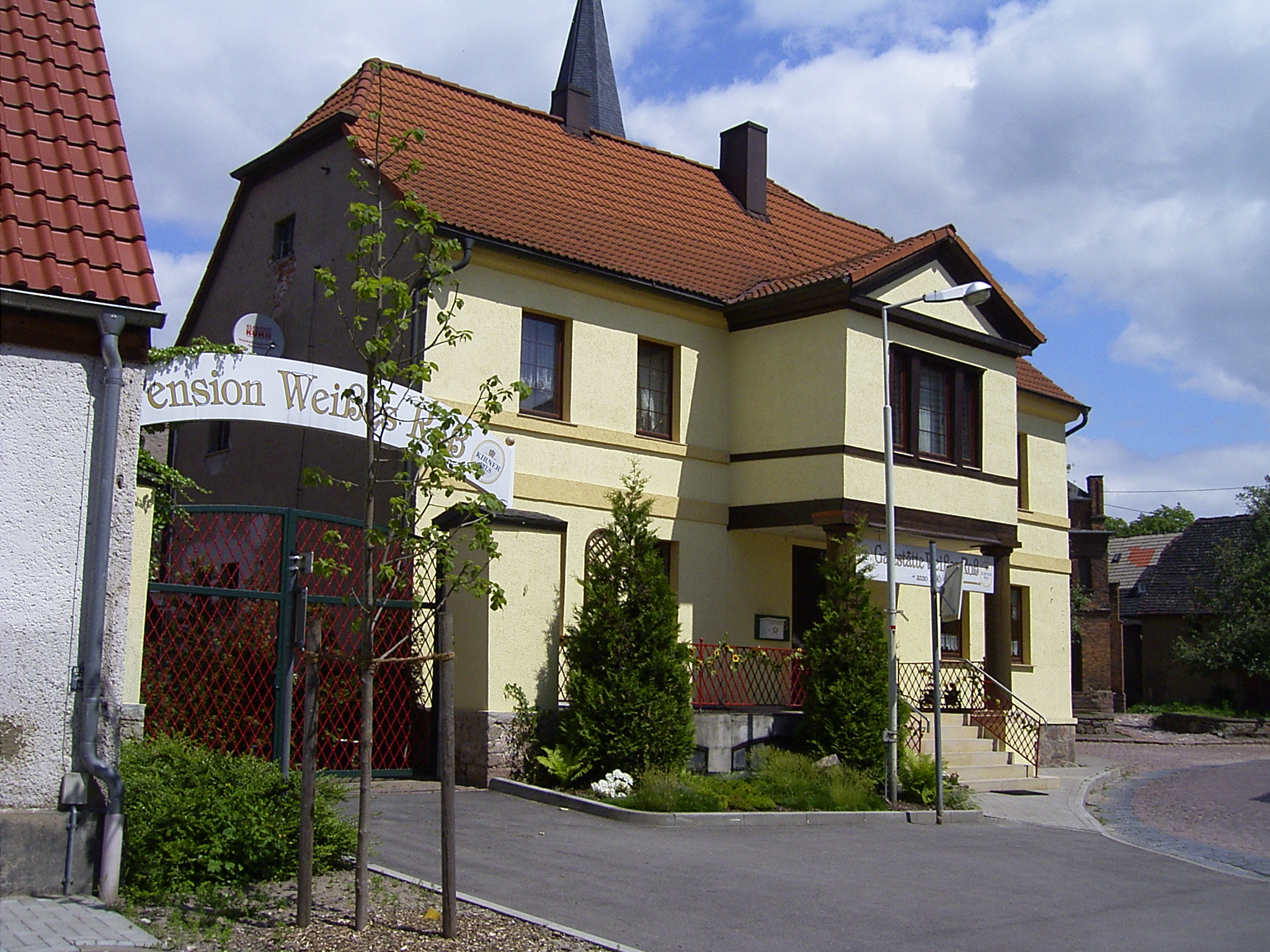 Gasthof Weisses Ross Radegast Anhalt